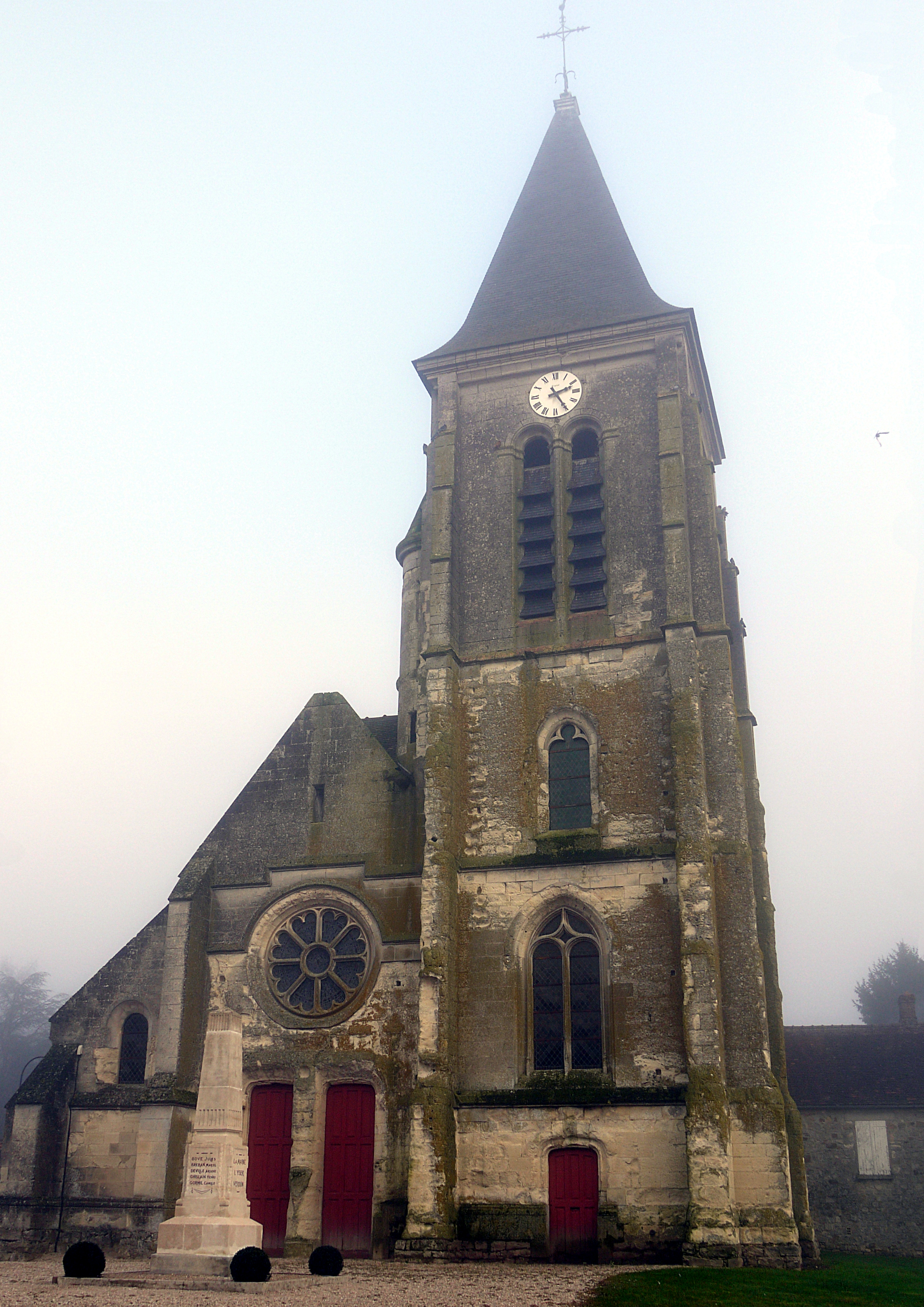 église Saint Martin de Billy-sur-Ourcq